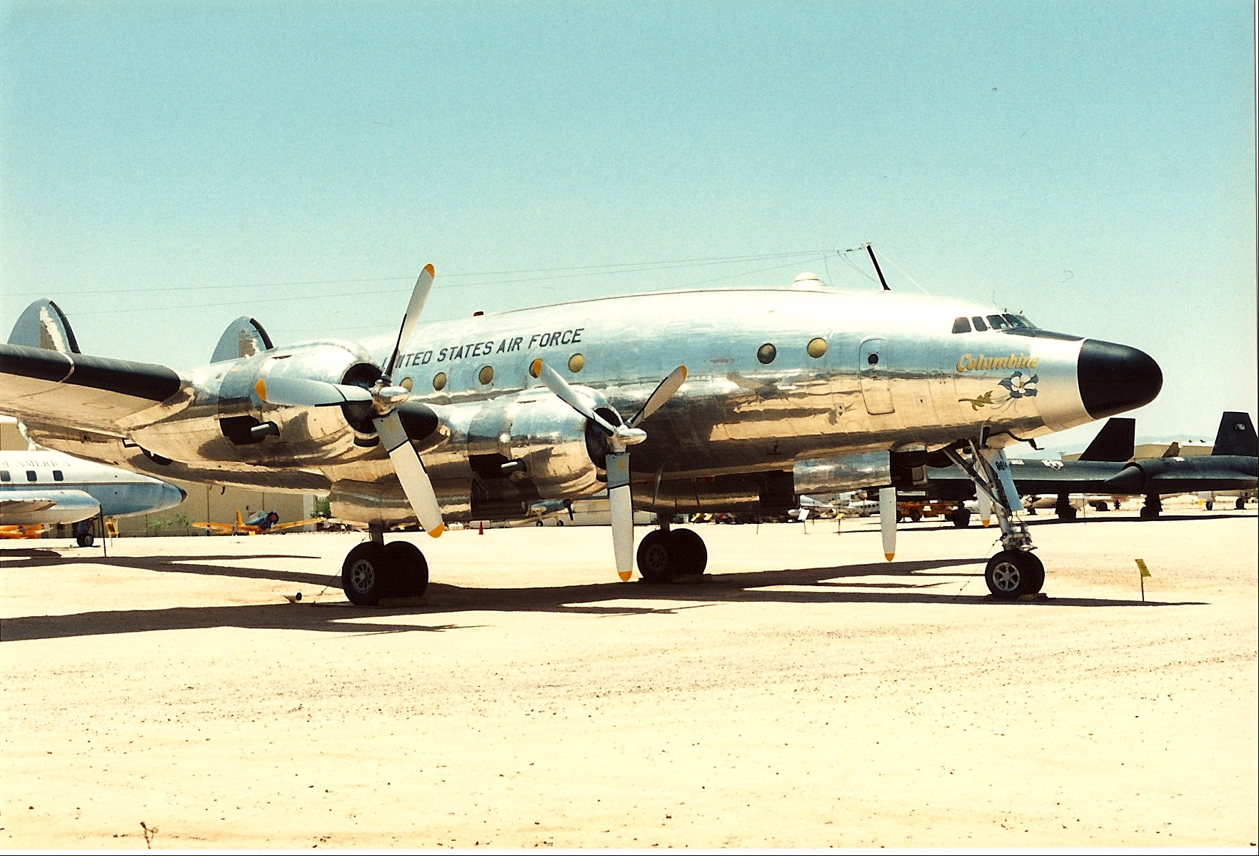 Columbine 94-a